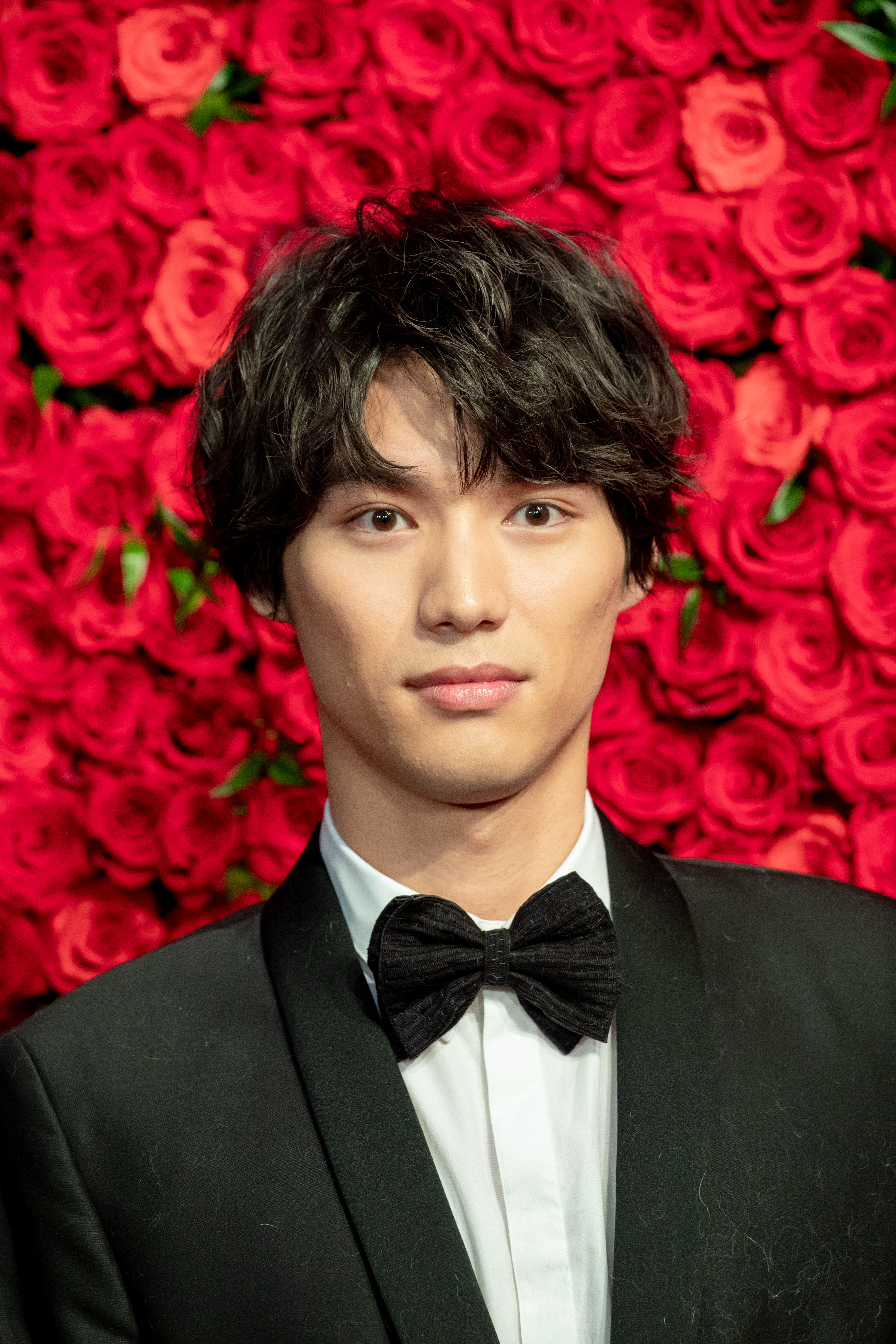 第30回 東京国際映画祭 オープニングセレモニー 福士蒼汰 (旅猫リポート)